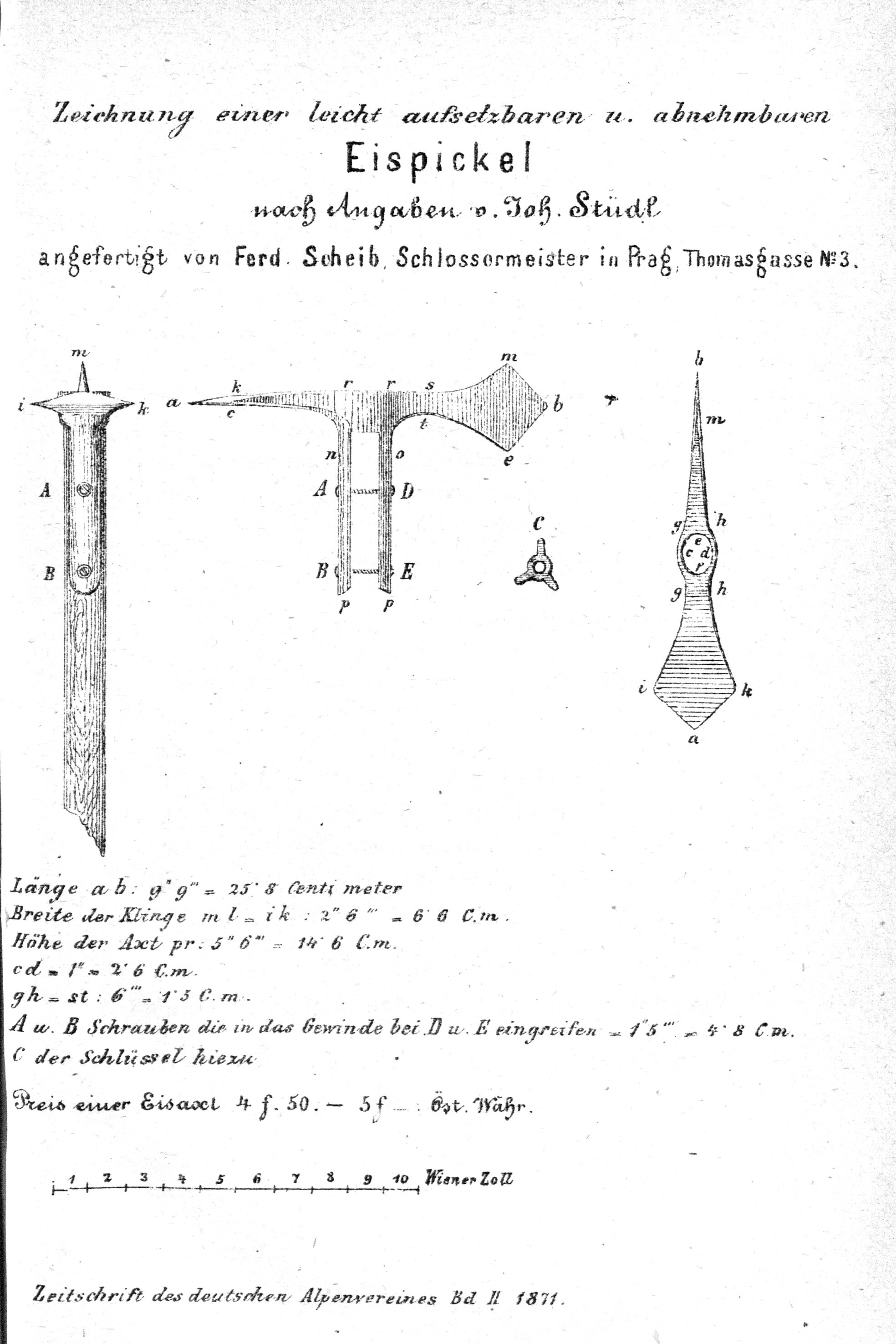 Zeichnung einer leicht aufsetzbaren u. abnehmbaren Eispickel aus Zeitschrift des Deutschen Alpenvereins 1871 Band II. Vereinsjahr 1870-1871